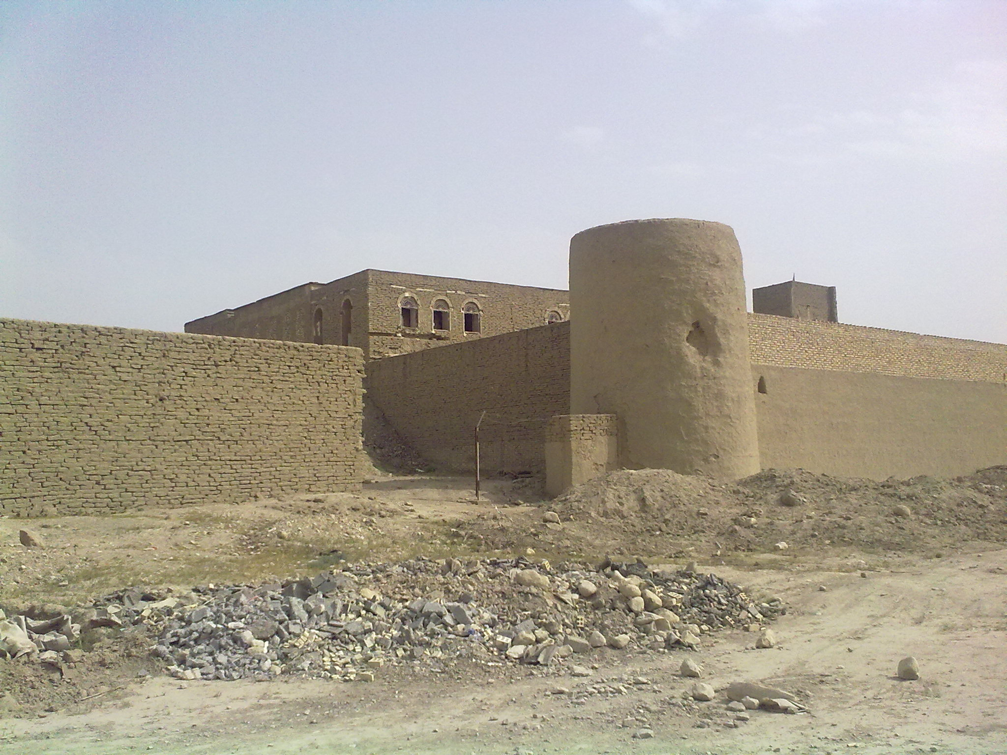 کلات.محل برخورد توپ